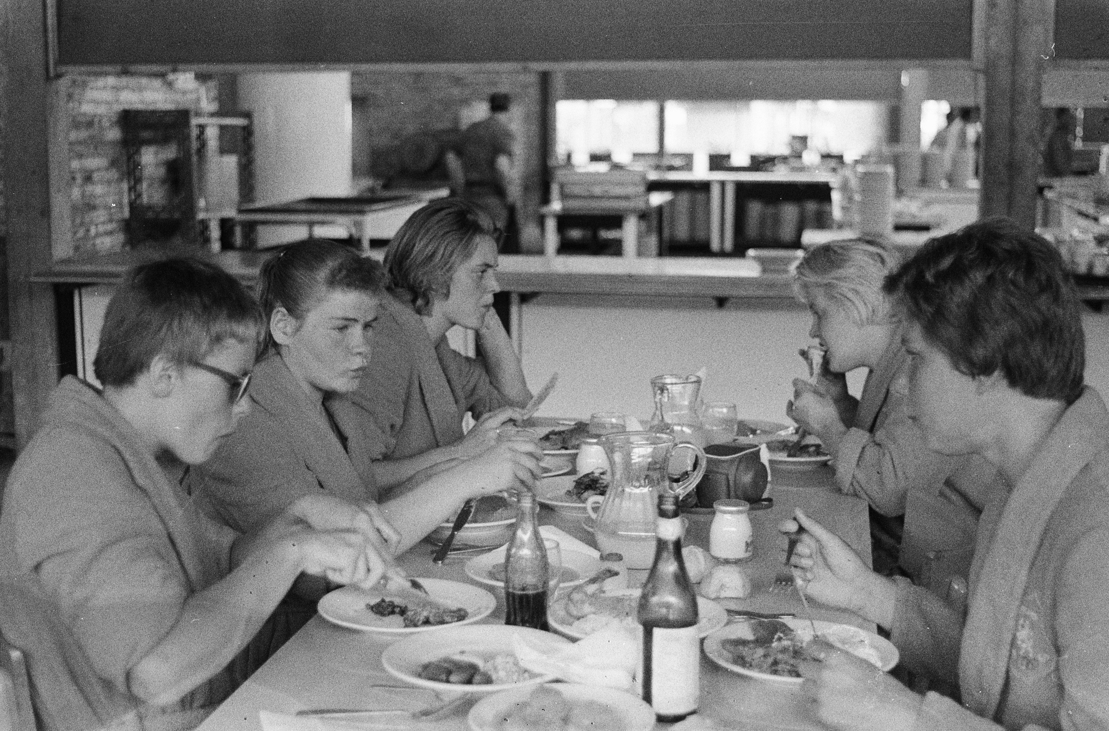 Collectie / Archief : Fotocollectie Anefo Reportage / Serie : [ onbekend ] Beschrijving : Olympische Spelen te Rome, zwemsters aan de maaltijd, links Gretta Kok , Rini Dobber , Jopie Troost , rechts Ada den Haan en Atie Voorbij Datum : 22 augustus 1960 Locatie : Rome Trefwoorden : atleten, restaurants, sport, zwemmen Persoonsnaam : Dobber, Rini, Haan, Ada den, Kok, Greta, Troost, Jopie, Voorbij, Atie Fotograaf : Pot, Harry / Anefo Auteursrechthebbende : Nationaal Archief Materiaalsoort : Negatief (zwart/wit) Nummer archiefinventaris : bekijk toegang 2.24.01.05 Bestanddeelnummer : 911-5221